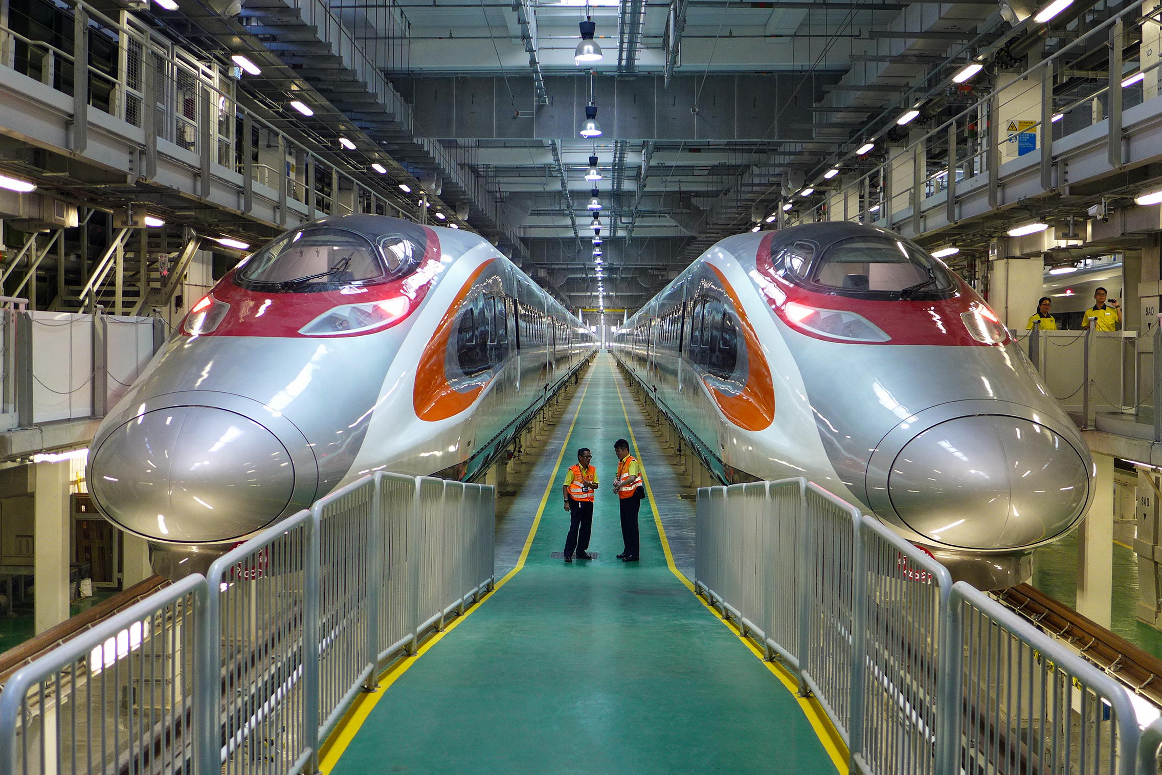 MTR CSR Sifang EMU in Shek Kong Stabling Sidings